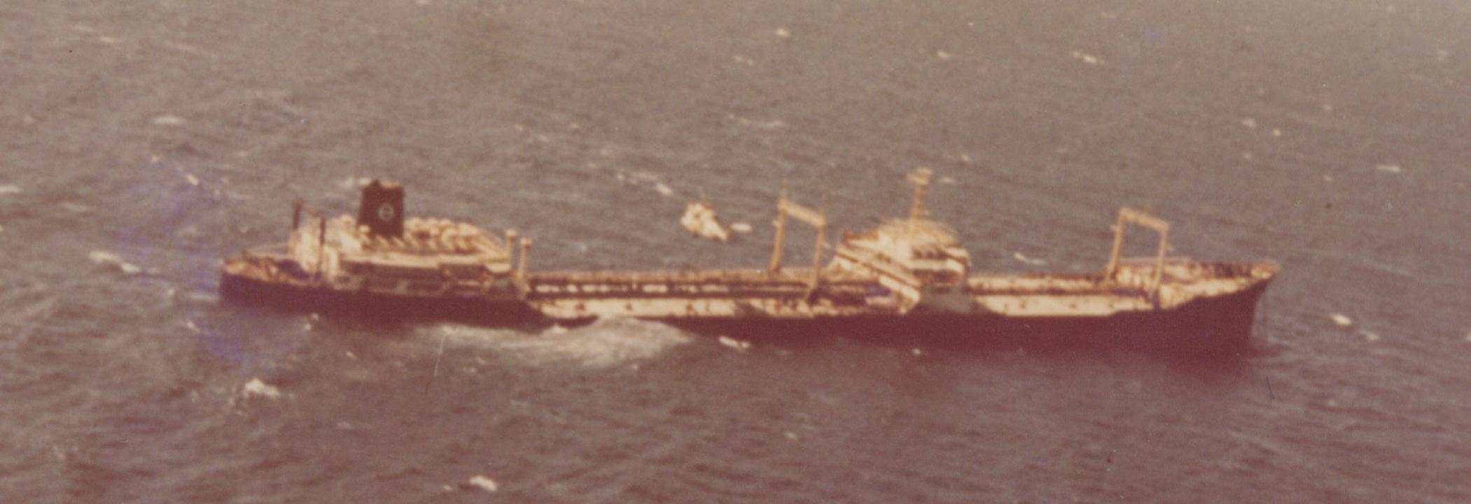 האונייה סיריס